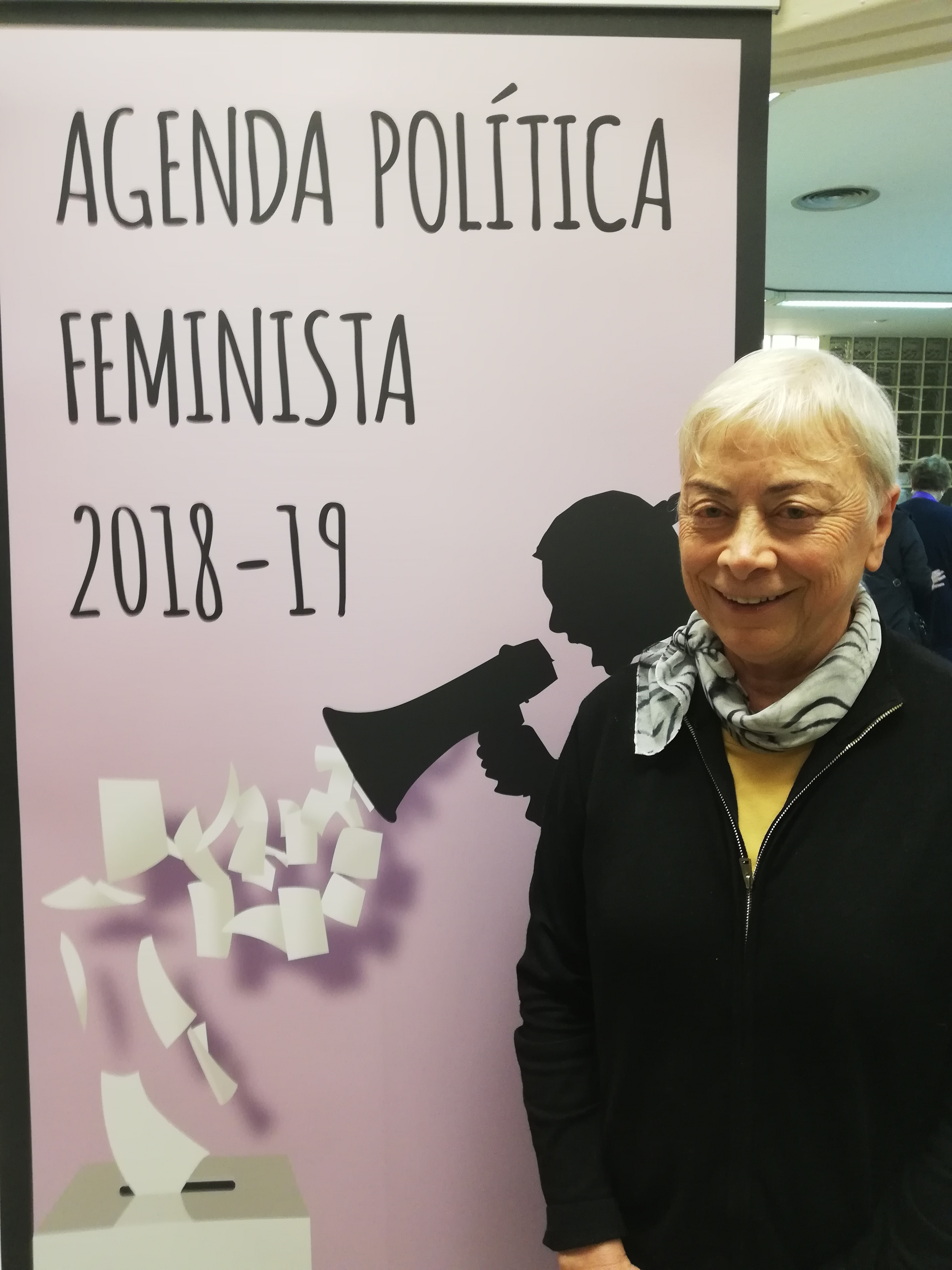 Begoña San José Serrán en el acto de presentación de la Agenda Política Feminista 2018 - 2019 organizado por el Fórum de Política Feminista.